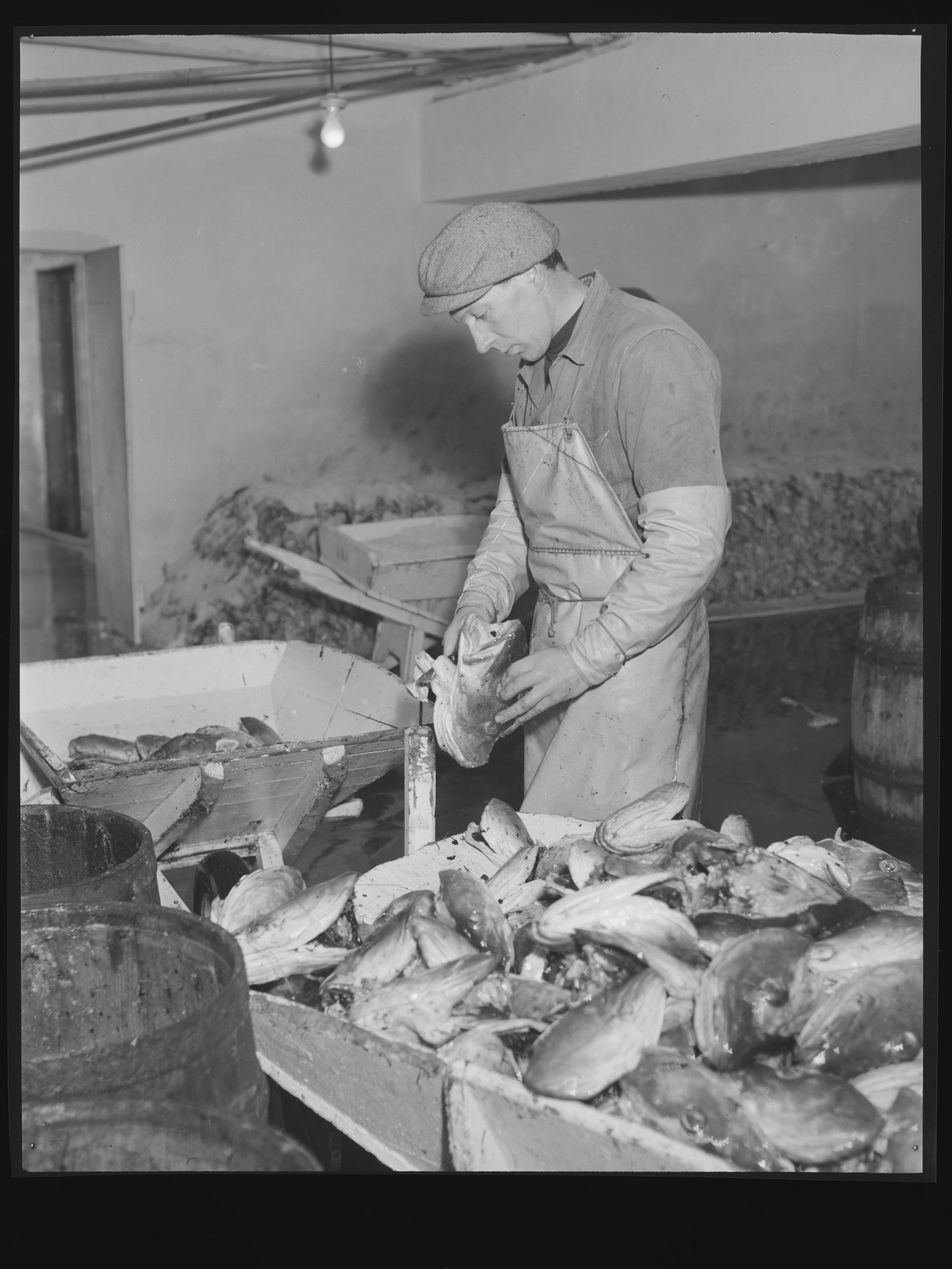 Bildet er hentet fra Nasjonalbibliotekets bildesamling Lofoten, Nordland